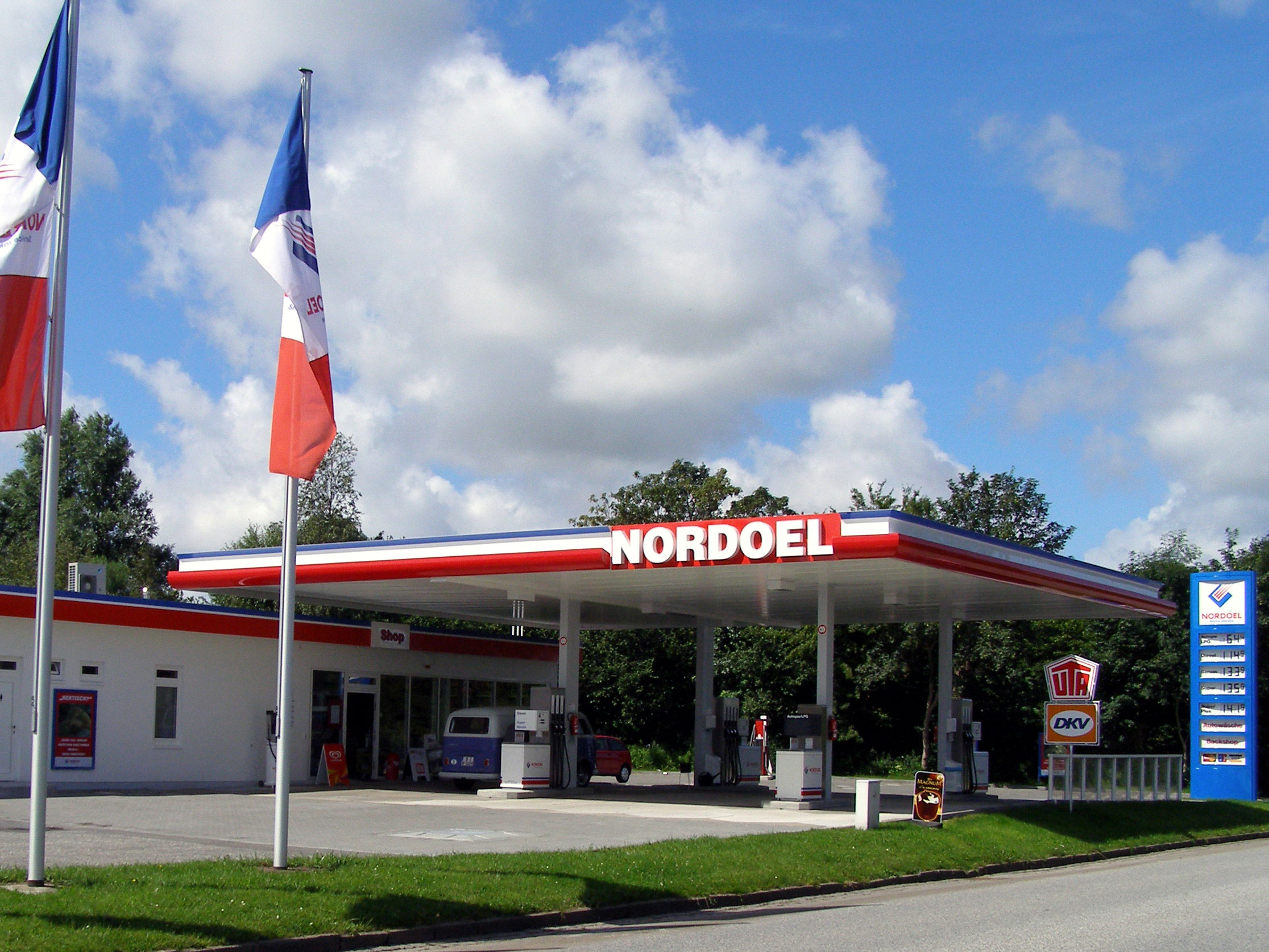 Tankstelle der Kette "Nordoel"